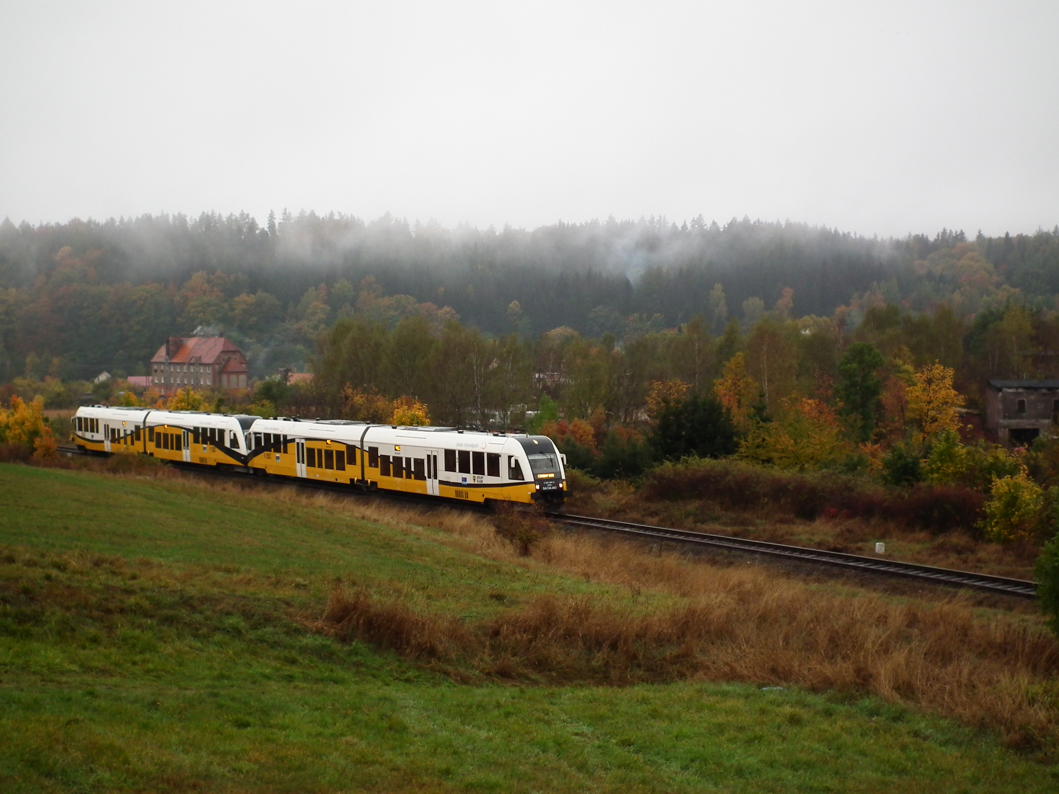 Impreza kolejowa Dolnośląskie Zakamaeki II w dniu 17 października 2015r. na liniach kolejowych Dolnego Śląska. Skład pociągu złożony z SA134-003 i SA134--007. Wjazd do Mieroszowa od str. czeskiej.